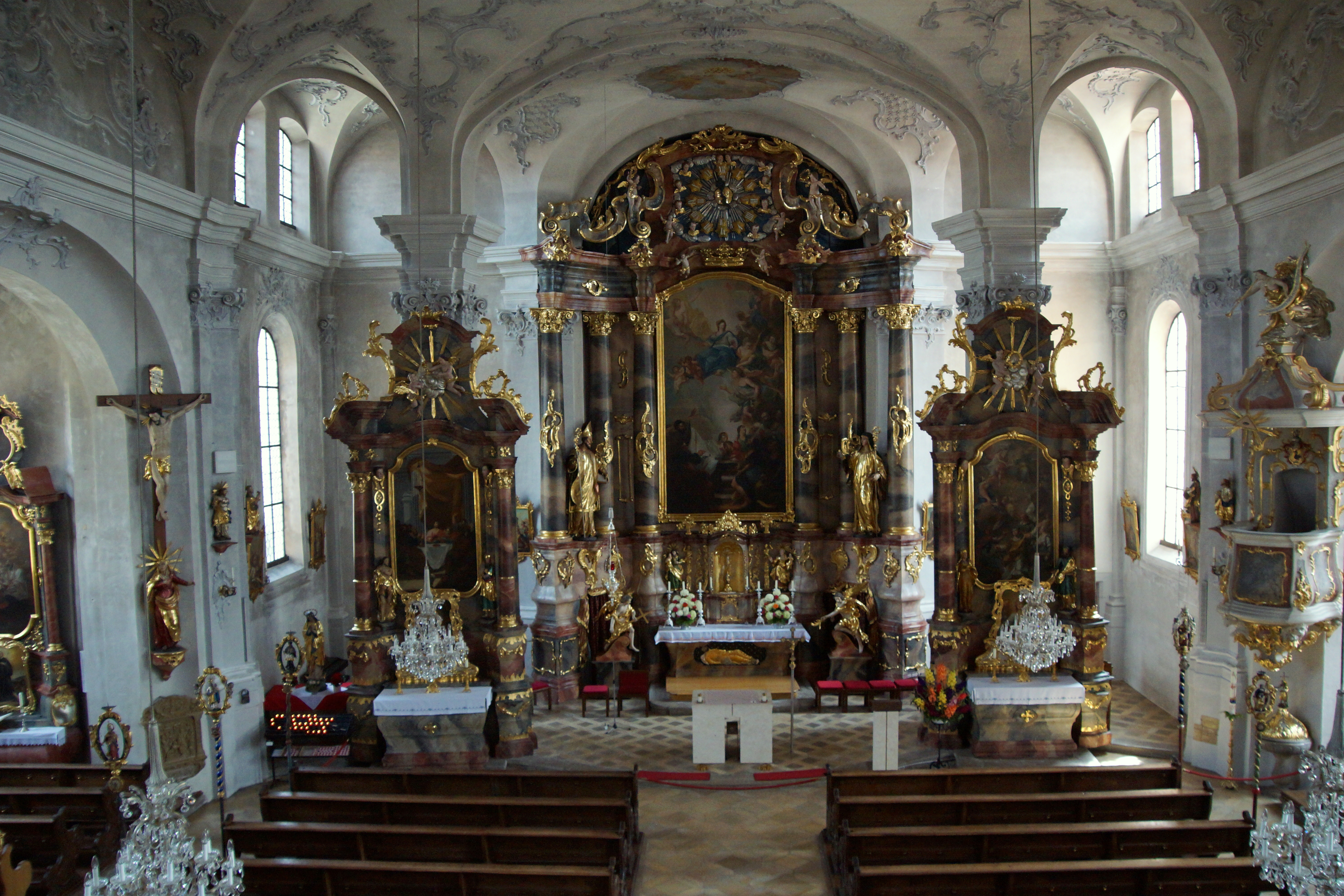 Die katholische Pfarrkirche Mariä Himmelfahrt in Berching in der Oberpfalz